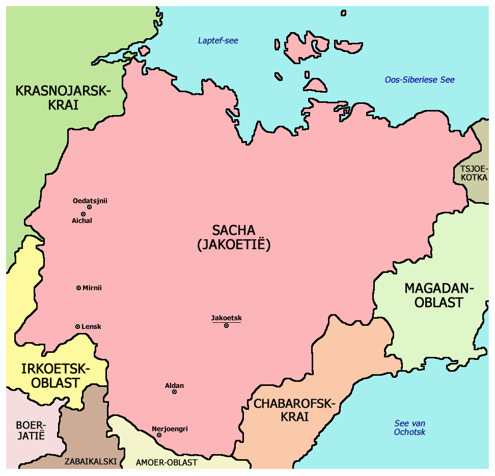 Kaart van Sacha in Rusland